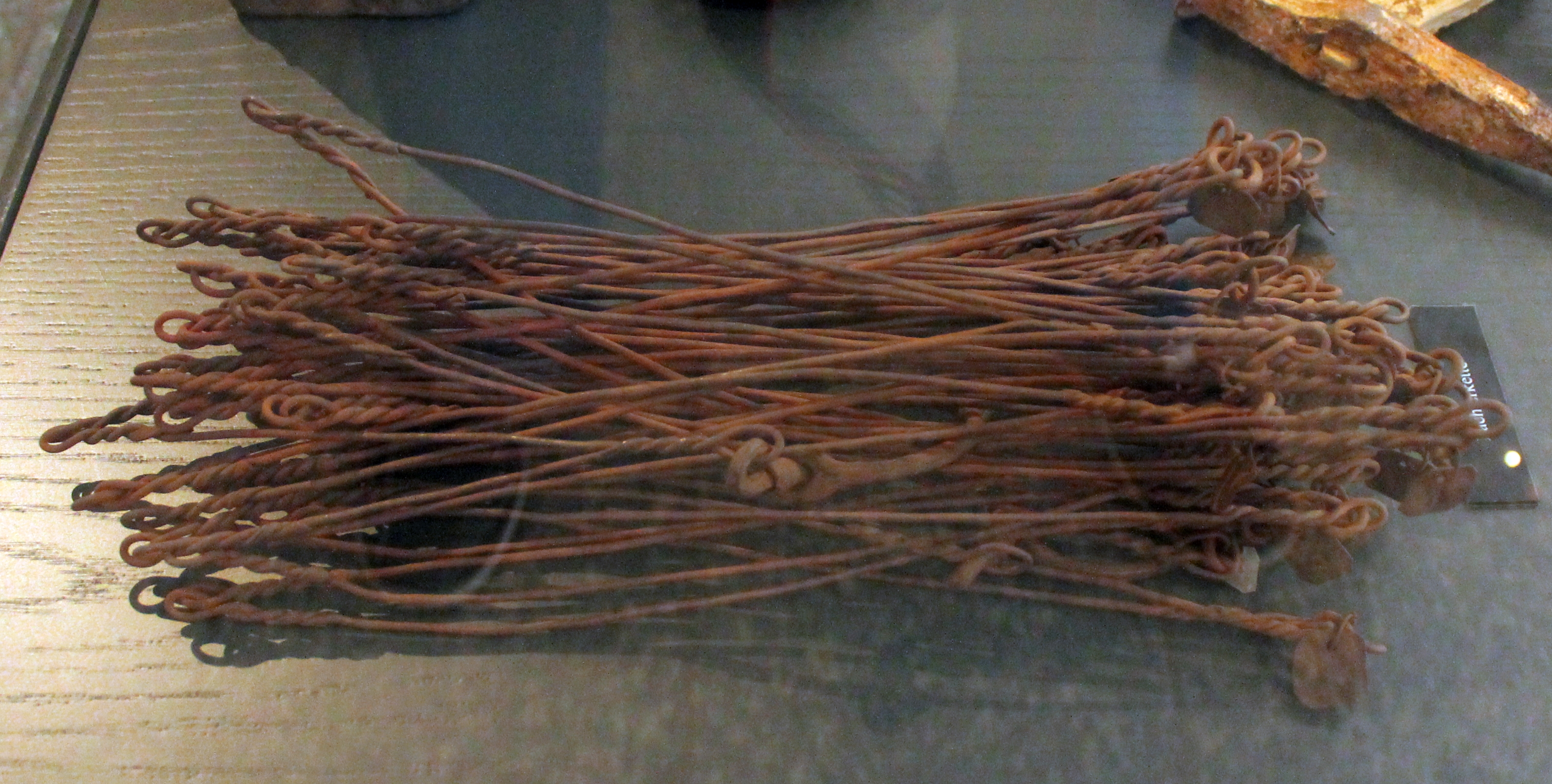 Lachterkette im Schneeberger Museum für erzgebirgische Volkskunst. Schneeberg, Sachsen, Deutschland